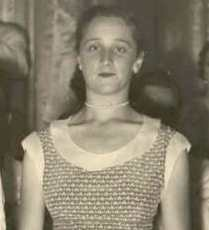 Françoise Guittet en 1952